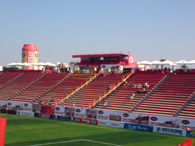 Estadio Caliente